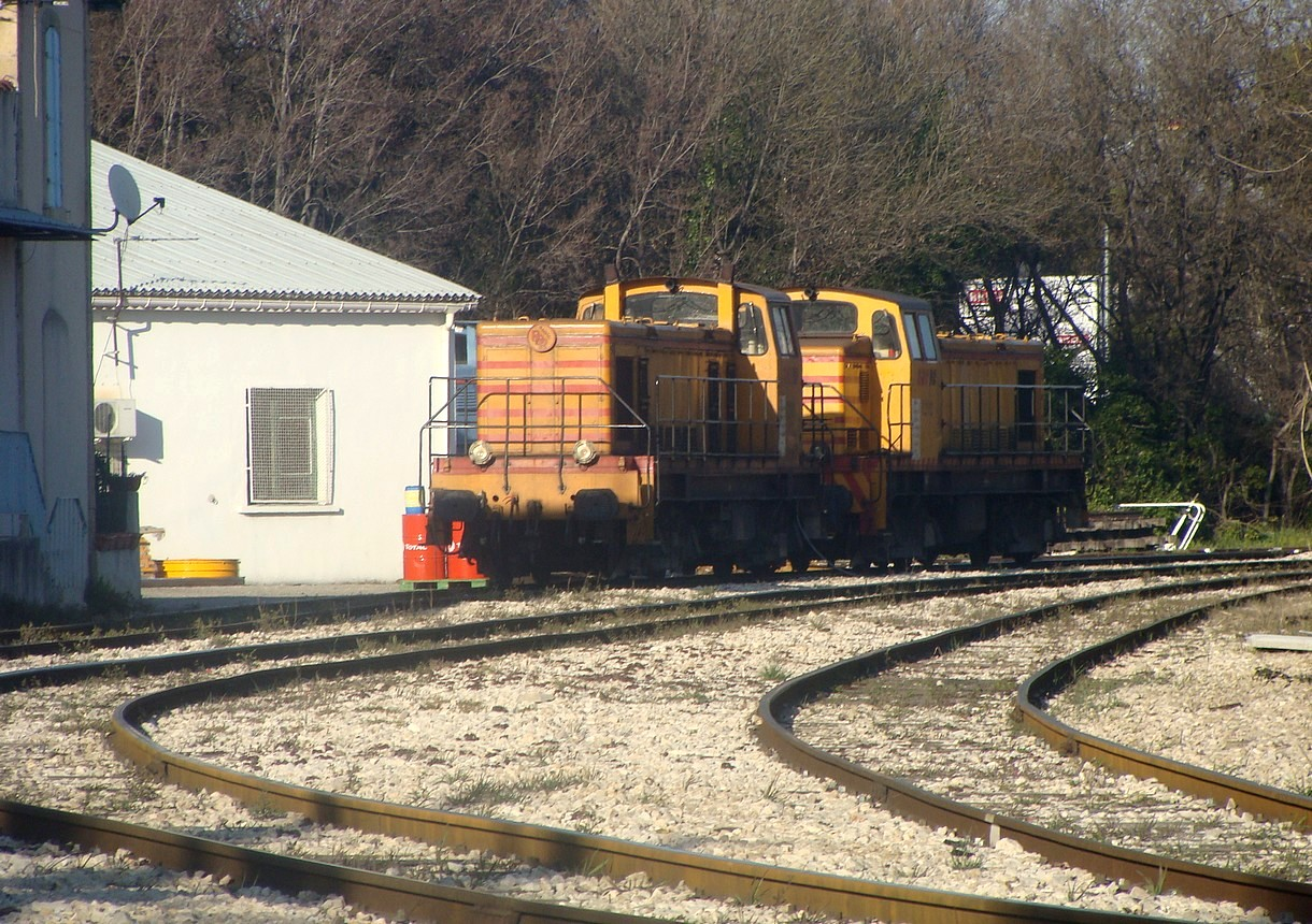 Engins de traction au repos au dépôt de Marignane de la RDT13.